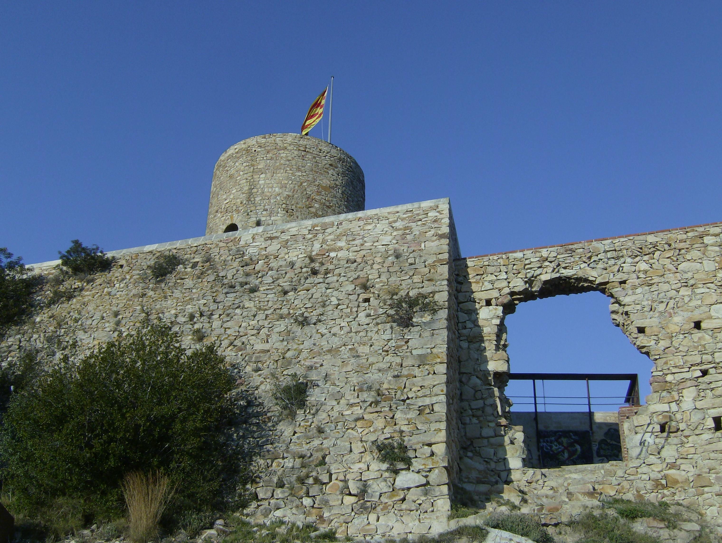 Castell de Sant Joan, Blanes, Cataluña